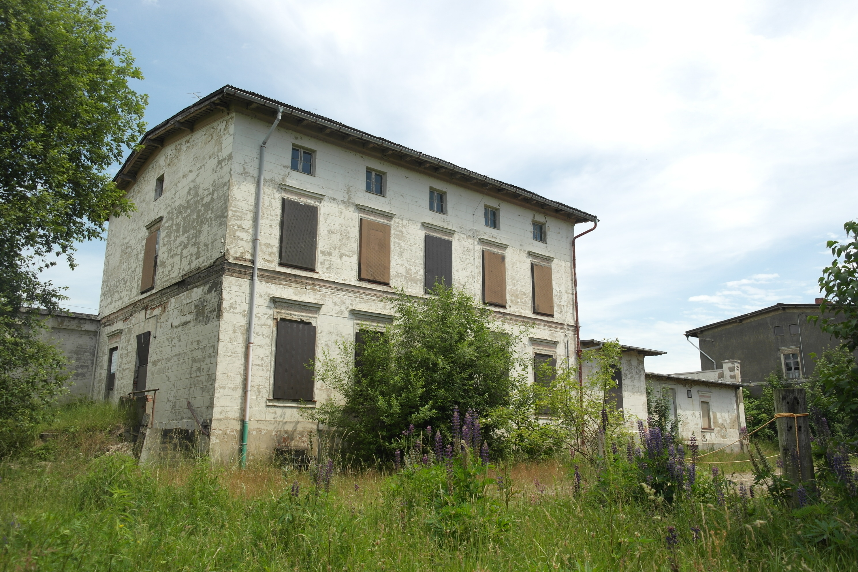 Empfangsgebäude mit Güterschuppen Bf. Klein Warnow, denkmalgeschützt